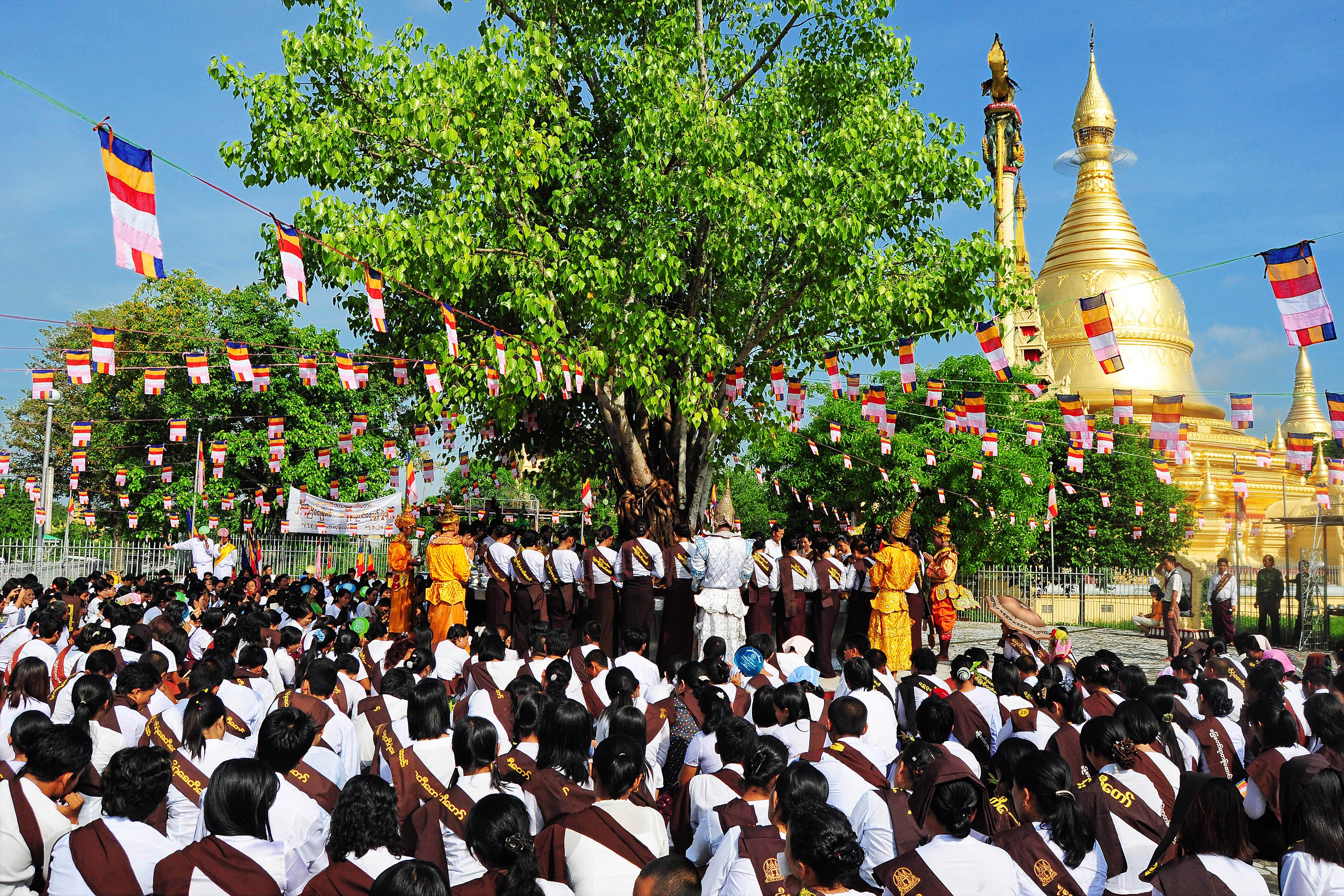 မြန်မာဘာသာ: ညောင်ရေသွန်းပွဲတော်